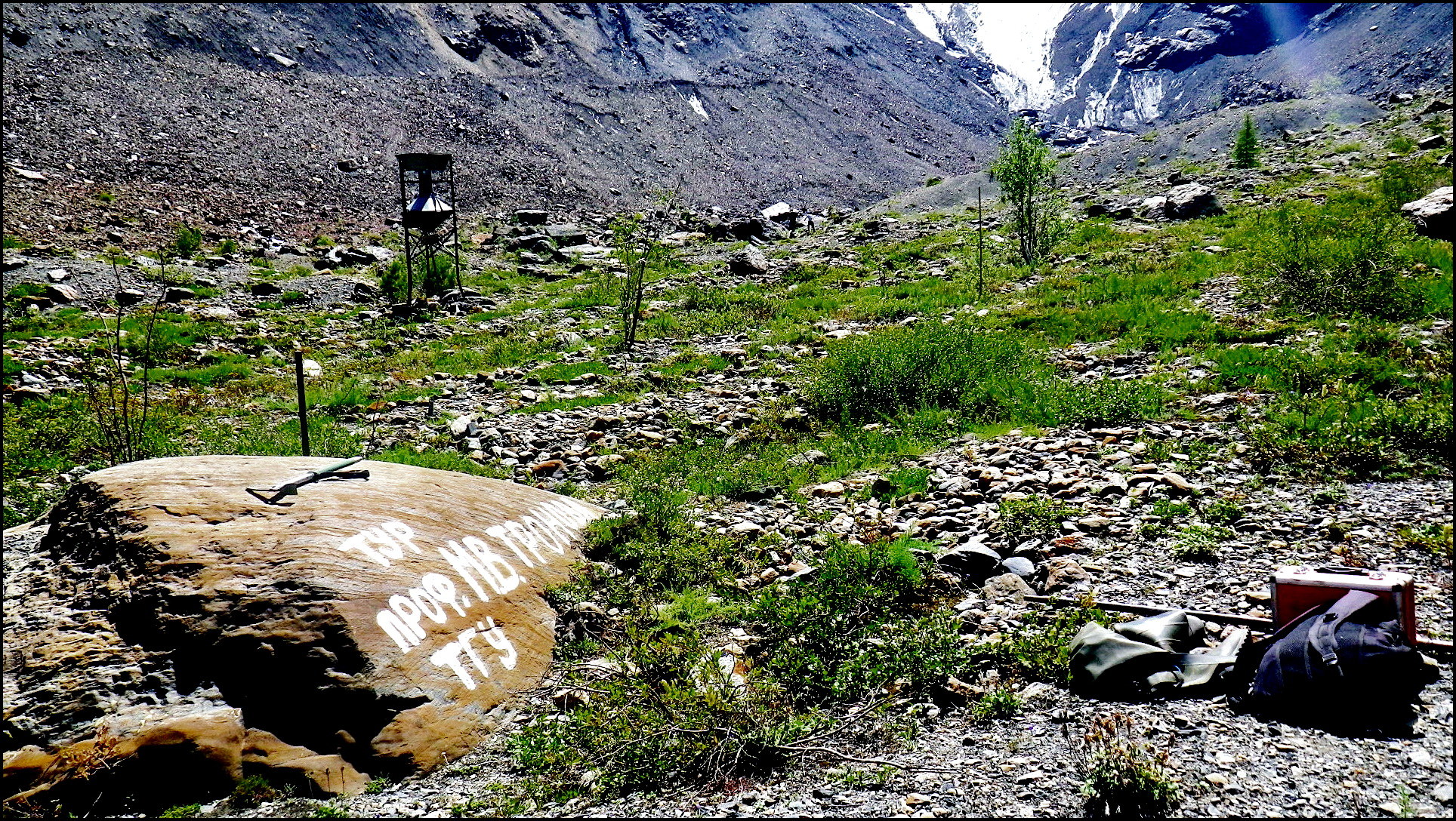 Тур профессора ТГУ М.В. Тронова, установленный у конца ледника Малый Актру в 1936 году.